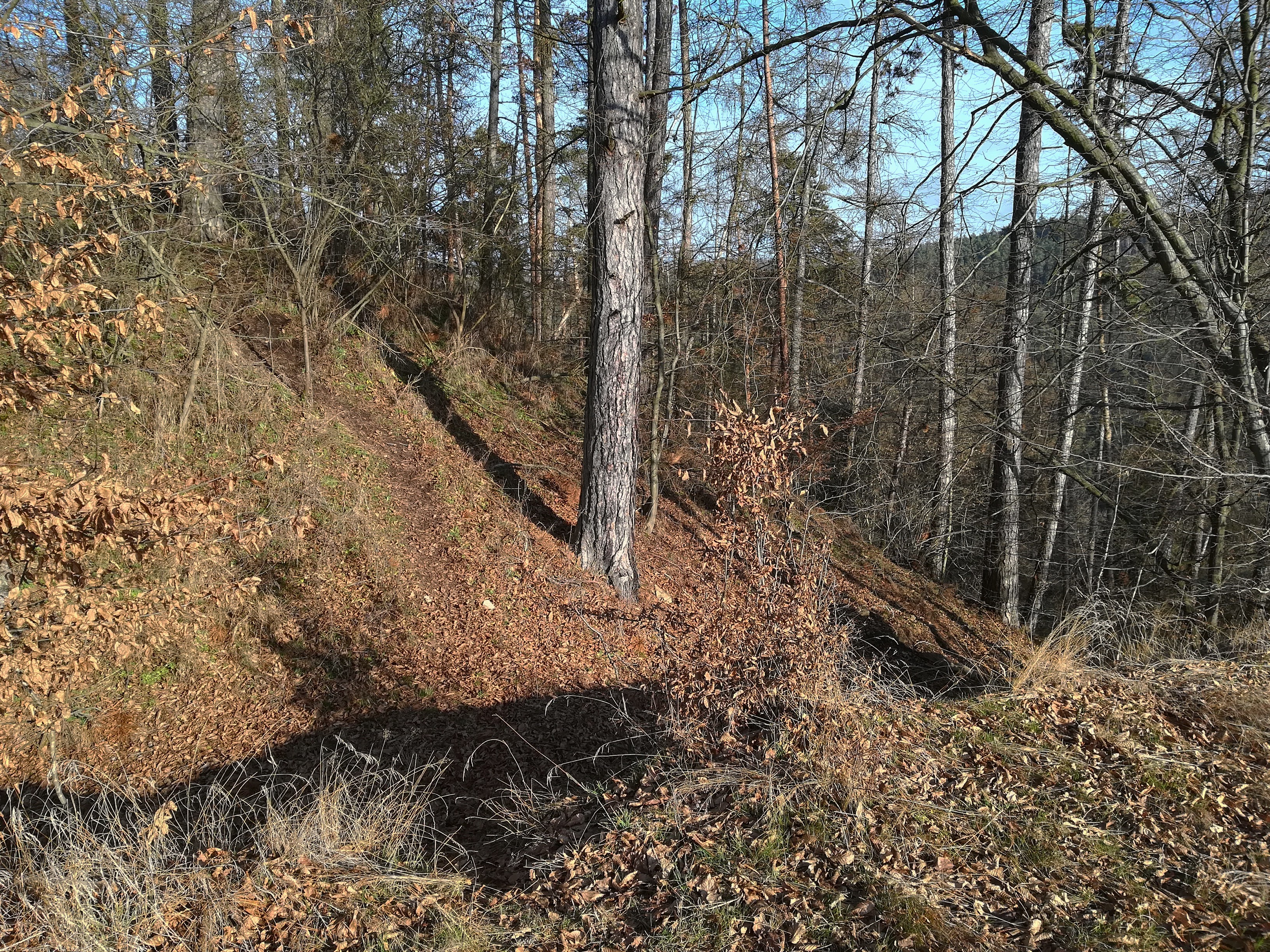 Skryje (okres Brno-venkov) - hrad Rysov, zbytky příkopu